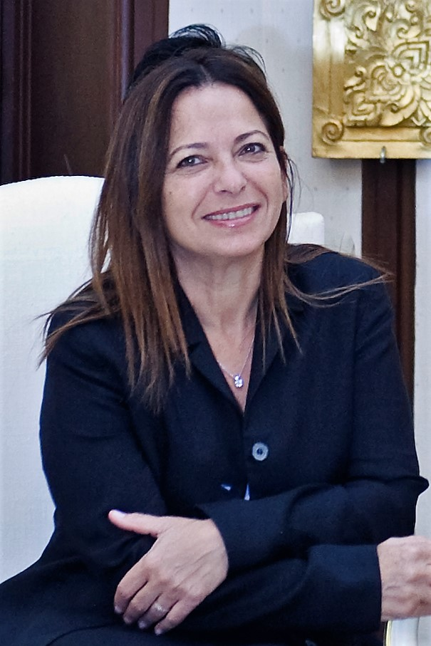 H.E.Mrs.Yael Rubinstein เอกอัครราชทูตรัฐอิสราเอลประจำประเทศไทย เข้าเยี่ยมคารวะนายกรัฐมนตรี เพื่ออำลาในโอกาสพ้นหน้าที่ ณ ห้องสีงาช้าง ตึกไทยคู่ฟ้า ทำเนียบรัฐบาล 6สิงหาคม2552 (The Official Site of The Prime Minister of Thailand Photo by พีรพัฒน์ วิมลรังครัตน์)